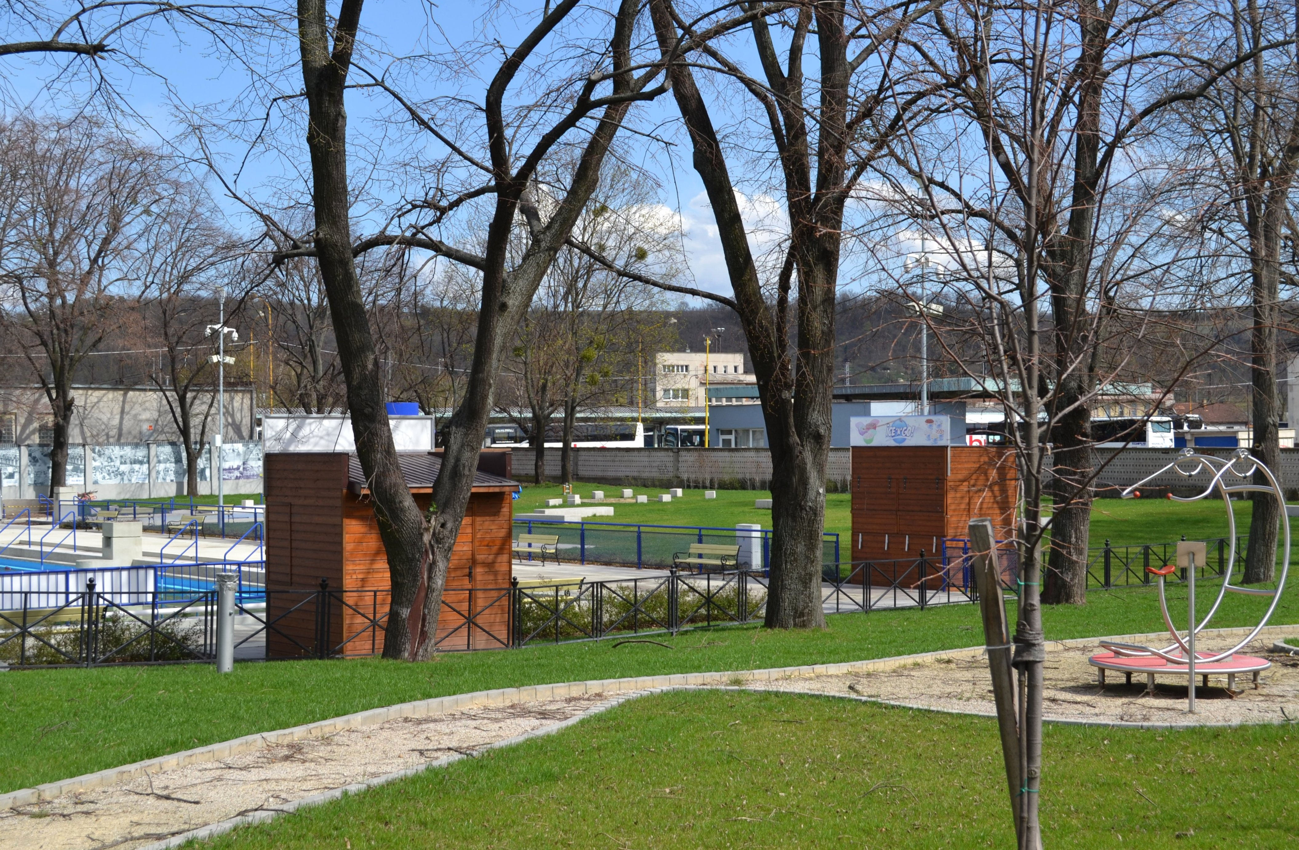 Verejné kúpalisko na Staničnom nám. 5 (sadovnícka úprava)